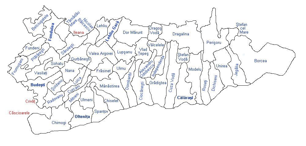 Categorie:Hărţi ale judeţului Călăraşi